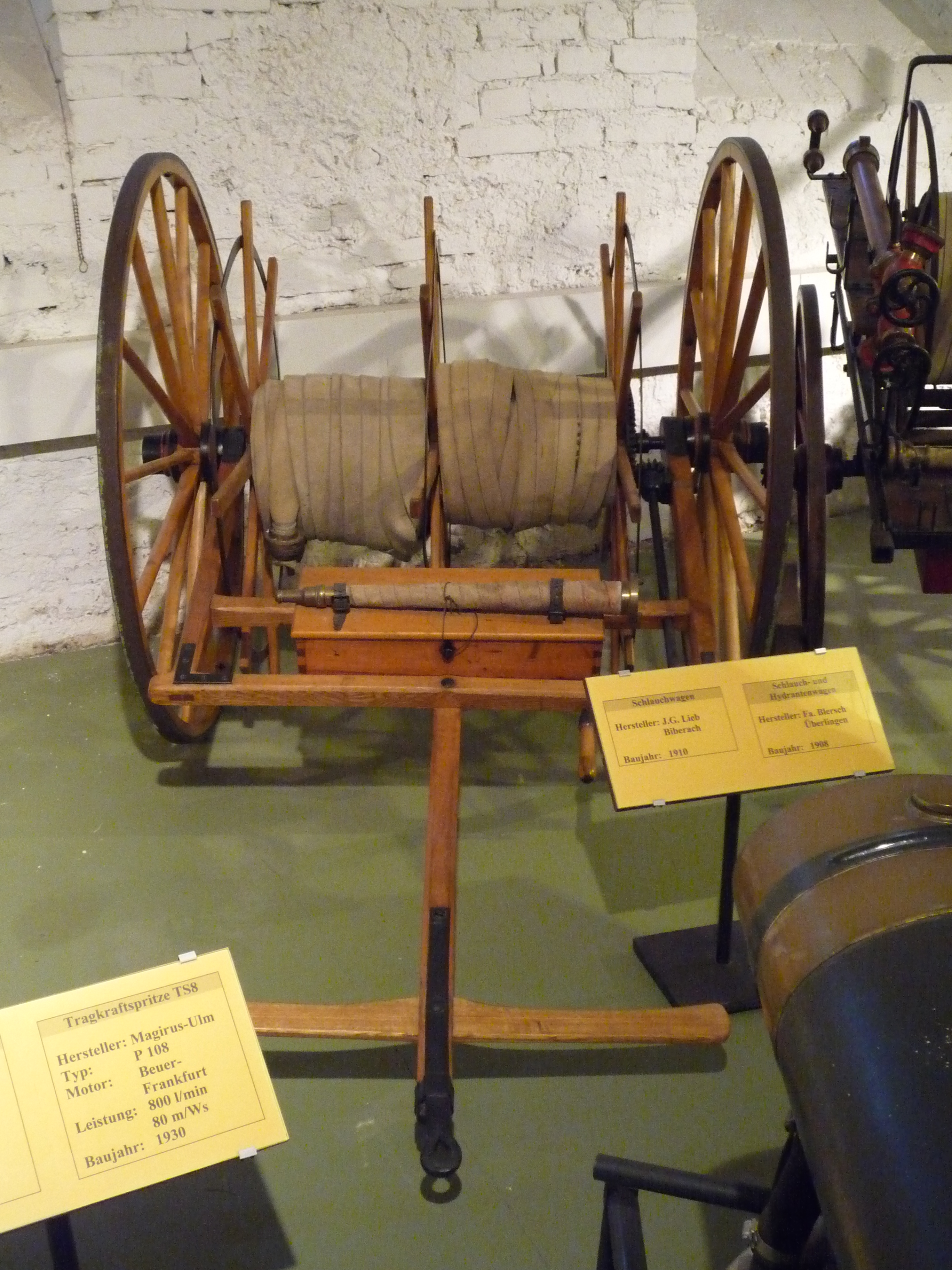 Schlauchwagen aus dem Jahr 1910 vom Hersteller J.G. Lieb aus Biberach im Feuerwehrmuseum Salem